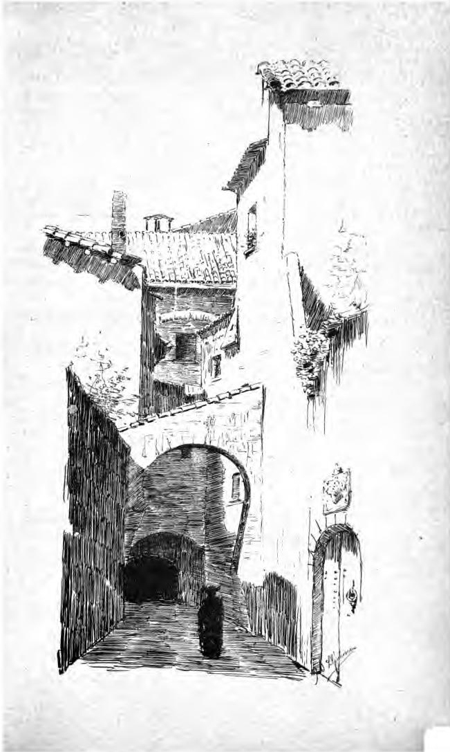 Vetusta.